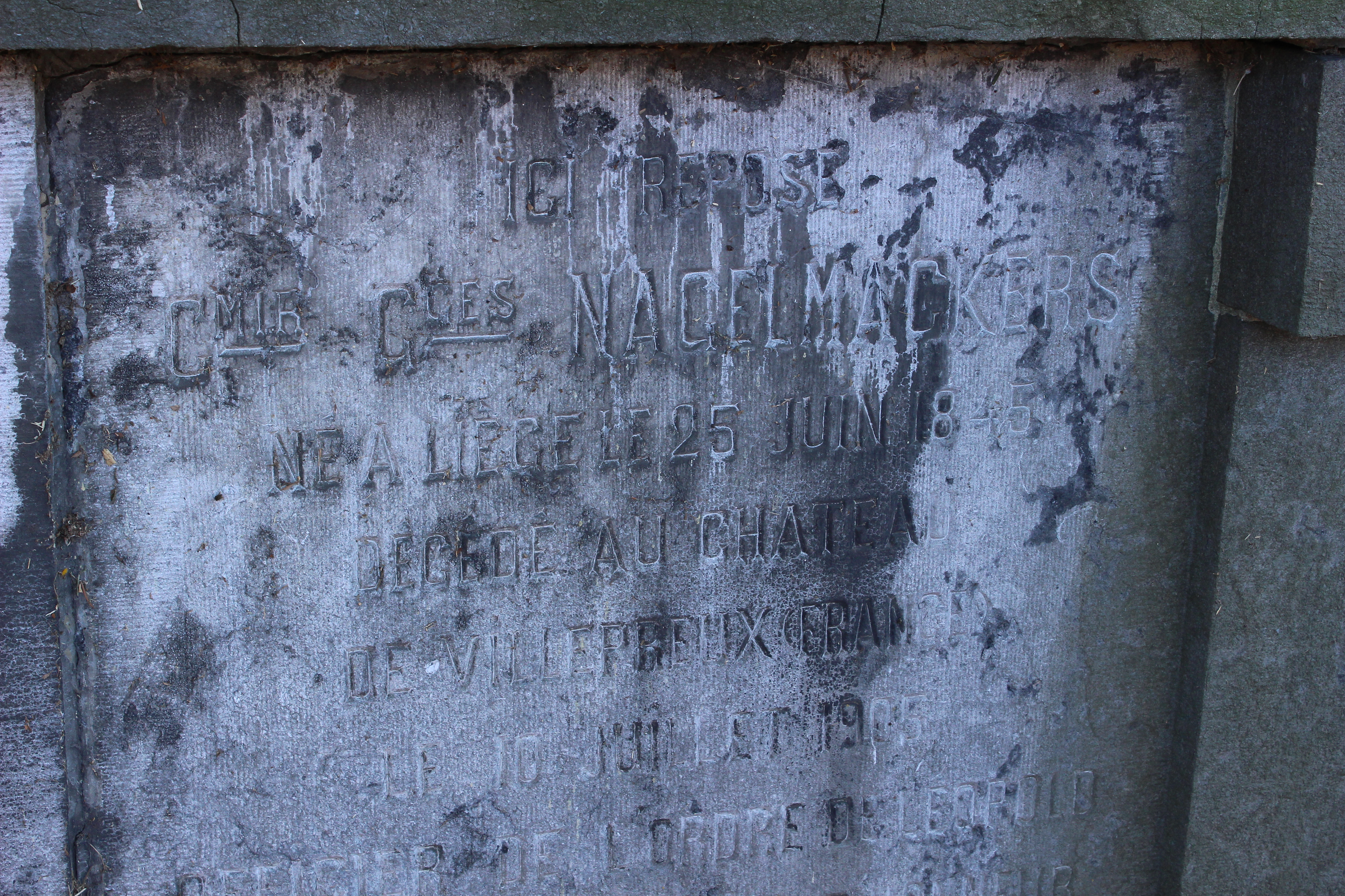 Voici la stèle de Georges Nagelmackers